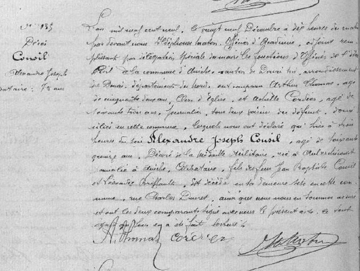 Kopierre Consil Alexandre Joseph acte de décès 29 décembre1909